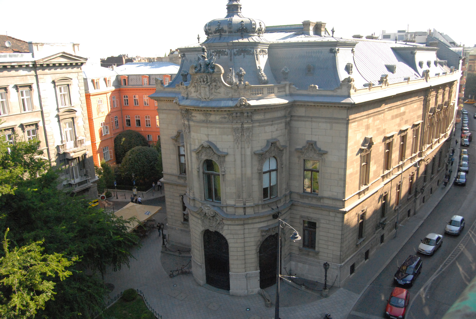 Az egykori Wenckheim-palota, ma a Fővárosi Szabó Ervin Könyvtár (Budapest VIII., Szabó Ervin tér 1., Baross Gábor utca 16., Reviczky Gyula utca 1.) This is a photo of a monument in Hungary. Identifier: 961